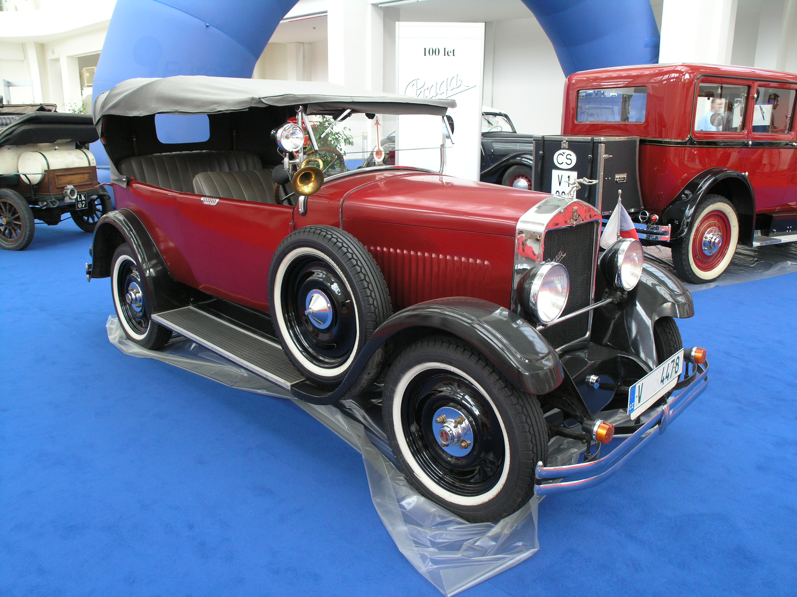 Vůz Praga Piccolo (1931) na výstavě Dědeček automobil v rámci Autosalónu v Brně, v roce 2007